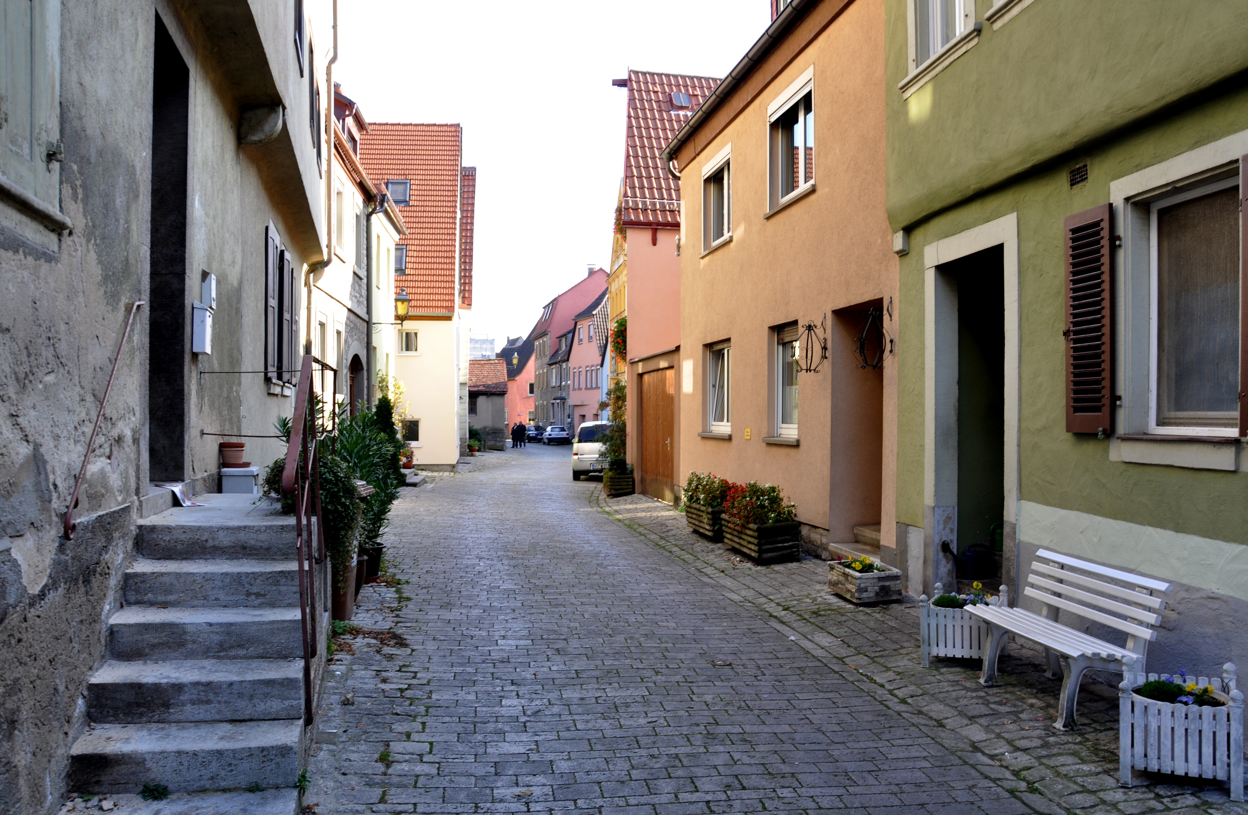 Ochsenfurt, Spitalgasse